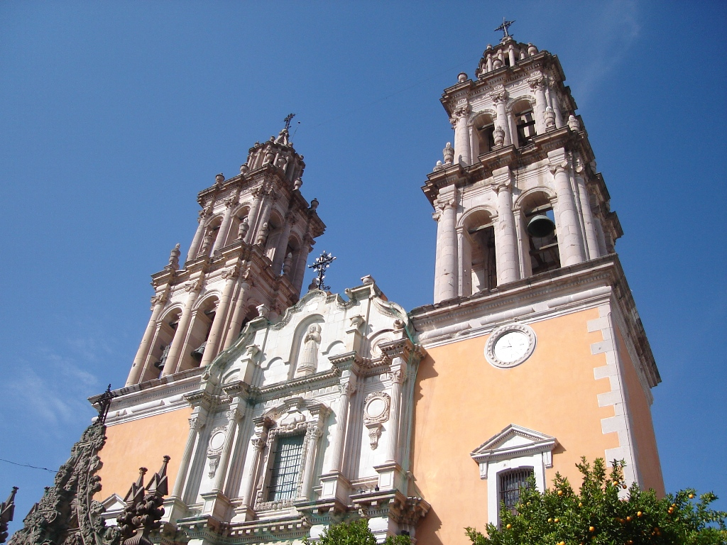 Santuario de Nuestra Señora de la Soledad, Jerez, Zac.